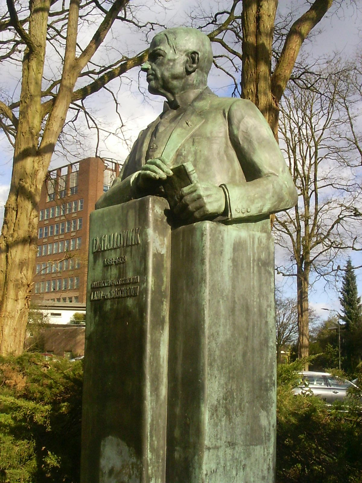 Arnhem, Apeldoornseweg 210 A, standbeeld H.J. Lovink